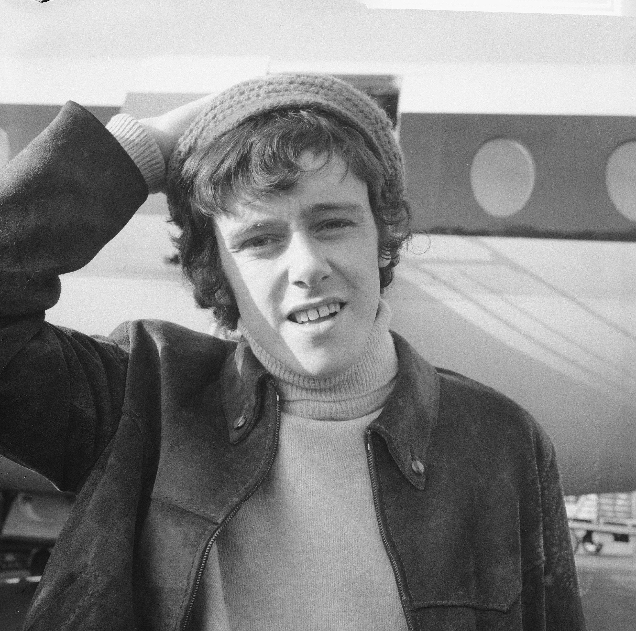 Collectie / Archief : Fotocollectie Anefo Reportage / Serie : [ onbekend ] Beschrijving : Aankomst Engelse zanger Donovan op Schiphol (optreden in fanclub) Datum : 3 februari 1966 Locatie : Noord-Holland, Schiphol Trefwoorden : aankomsten, zangers Persoonsnaam : Donovan Fotograaf : Evers, Joost / Anefo Auteursrechthebbende : Nationaal Archief Materiaalsoort : Negatief (zwart/wit) Nummer archiefinventaris : bekijk toegang 2.24.01.03 Bestanddeelnummer : 918-7452 Reacties Geplaatst door Jeugdcultuur - Muziekprogramma's op 31 december 2017 - 15:22. NB. 'Fanclub' was een VARA televisieprogramma met muziek voor de tieners.